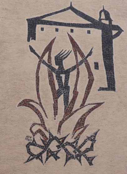 Mosaik zur Erinnerung an den sog. Hexenturm in Salzburg